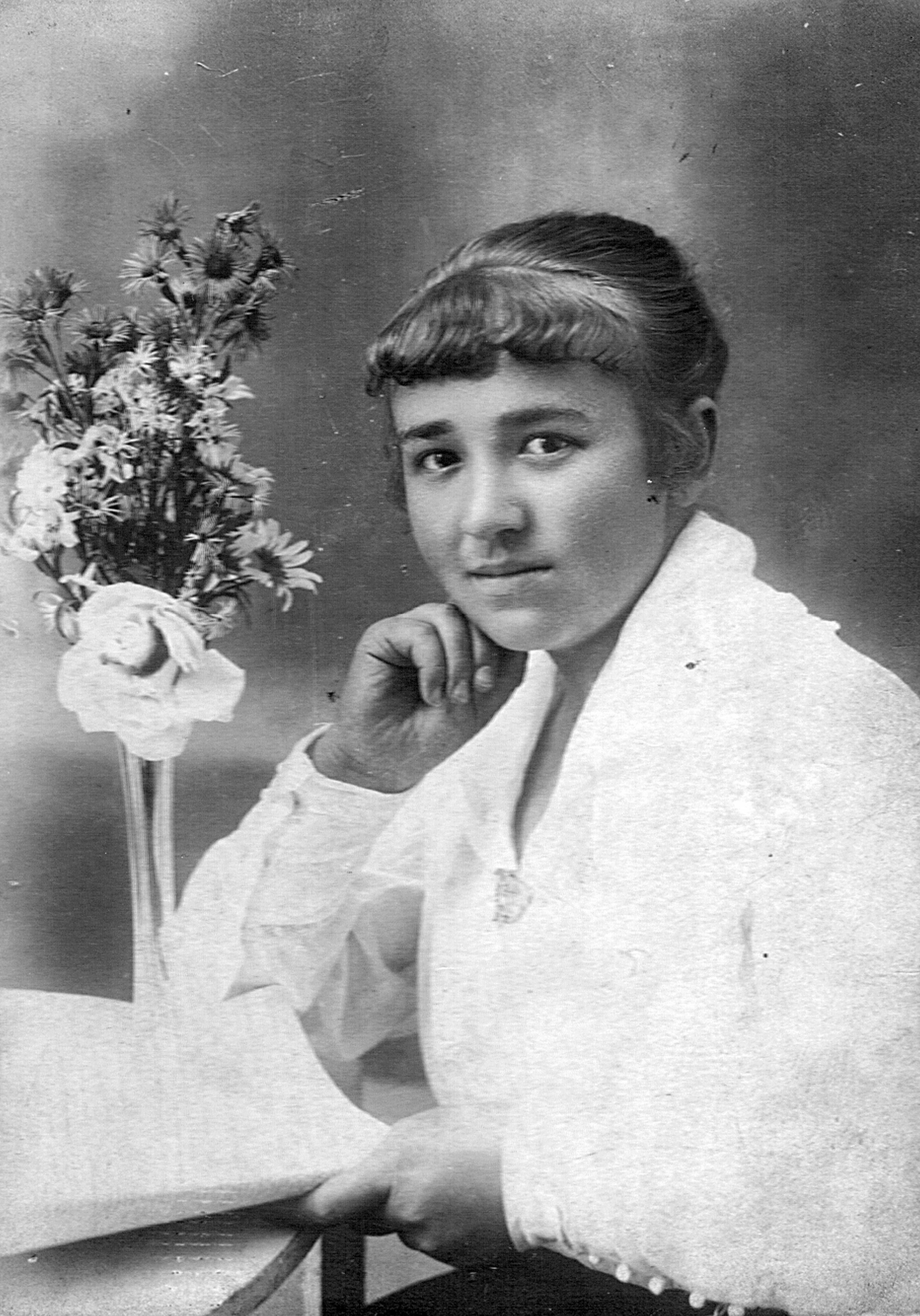 Maria Stryczek z Dziedzic (ok. 1915), przyszła żona Stanisława Krzyżowskiego